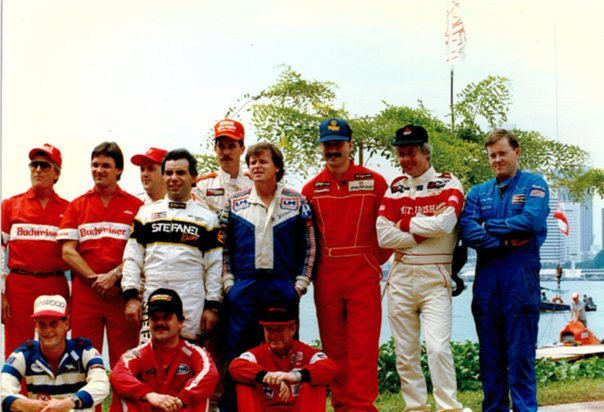 Singapore Grand Prix 1987